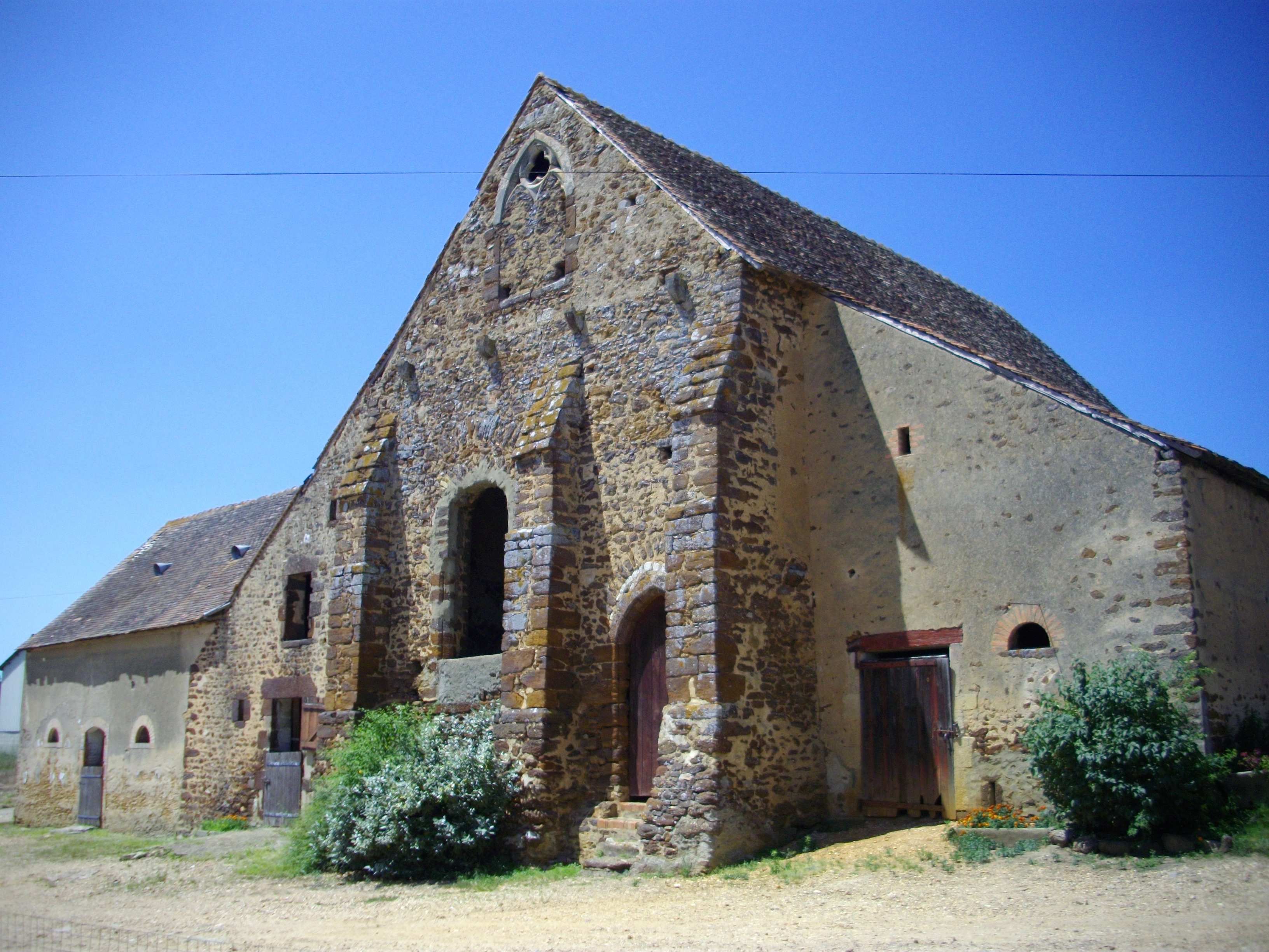 Le manoir de La Perrière, construit avant le XIIIe siècle, par un seigneur rural, au milieu d’une exploitation agricole. L’activité laitière actuelle du propriétaire pérennise cette situation exceptionnelle